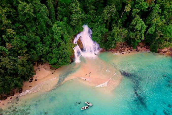 Air Terjun Kiti Kiti di Distrik Karas Kabupaten Fakfak, Papua Barat Indonesia